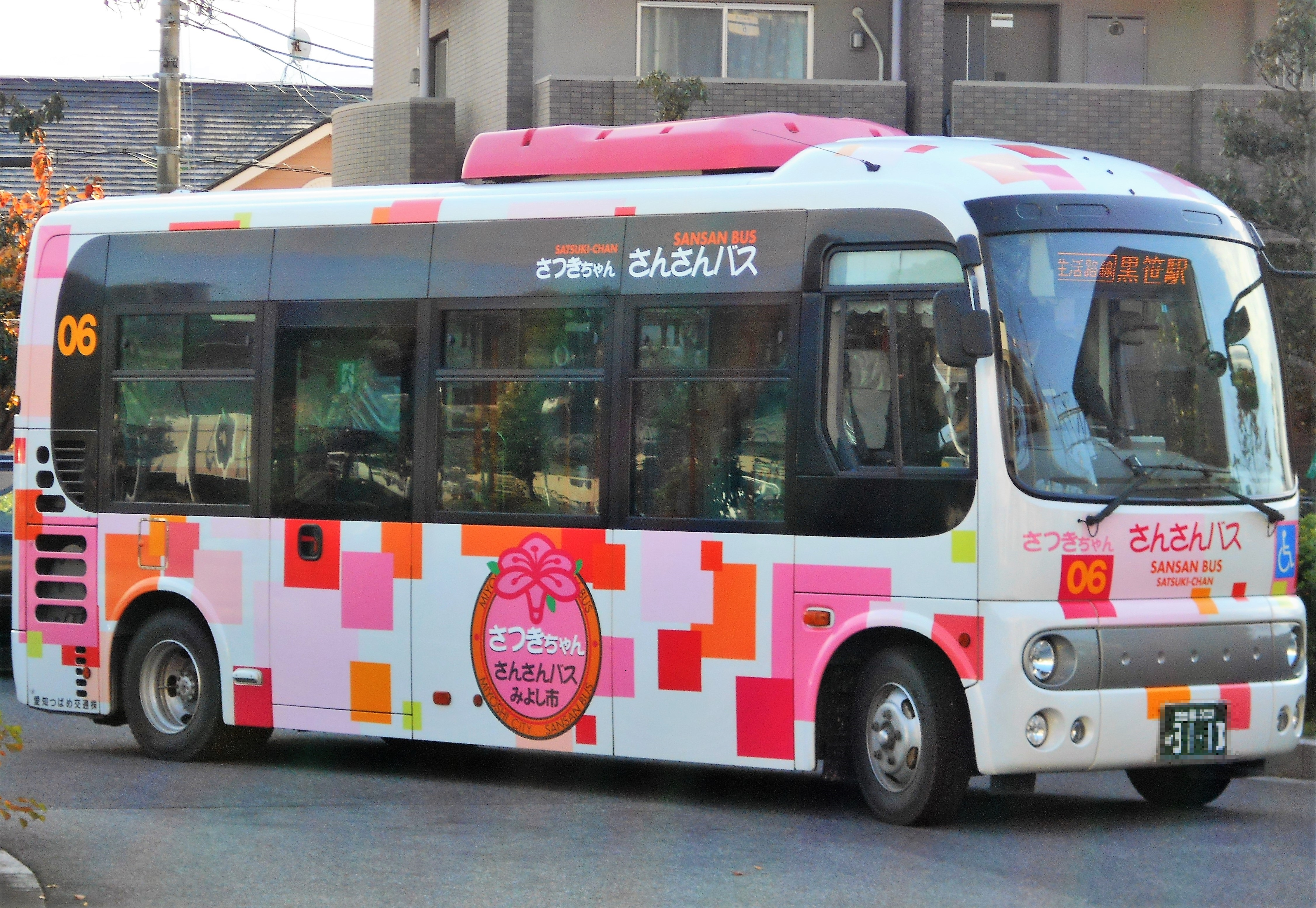 さんさんバス・さつきちゃん（生活路線）用車両［愛知県みよし市、黒笹駅にて撮影。2016年11月］